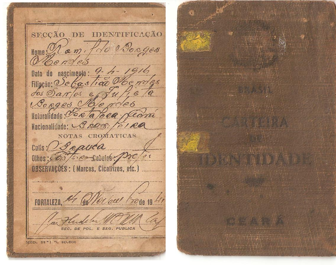 Arquivo Memorial Dr. Romildo Borges Mendes